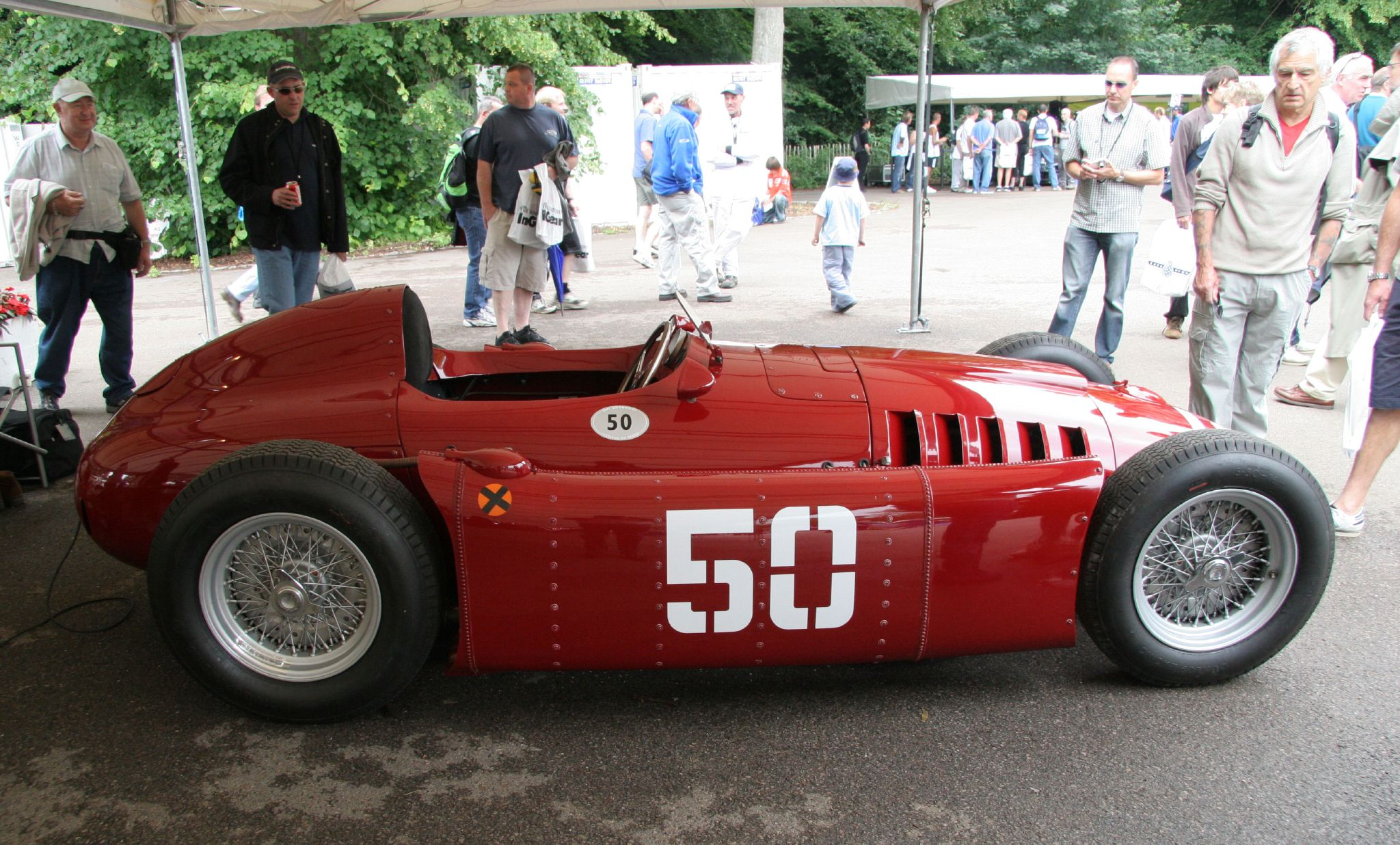 Lancia D50A, Formel-1-Rennwagen von 1954, Goodwood Festival of Speed, 2007